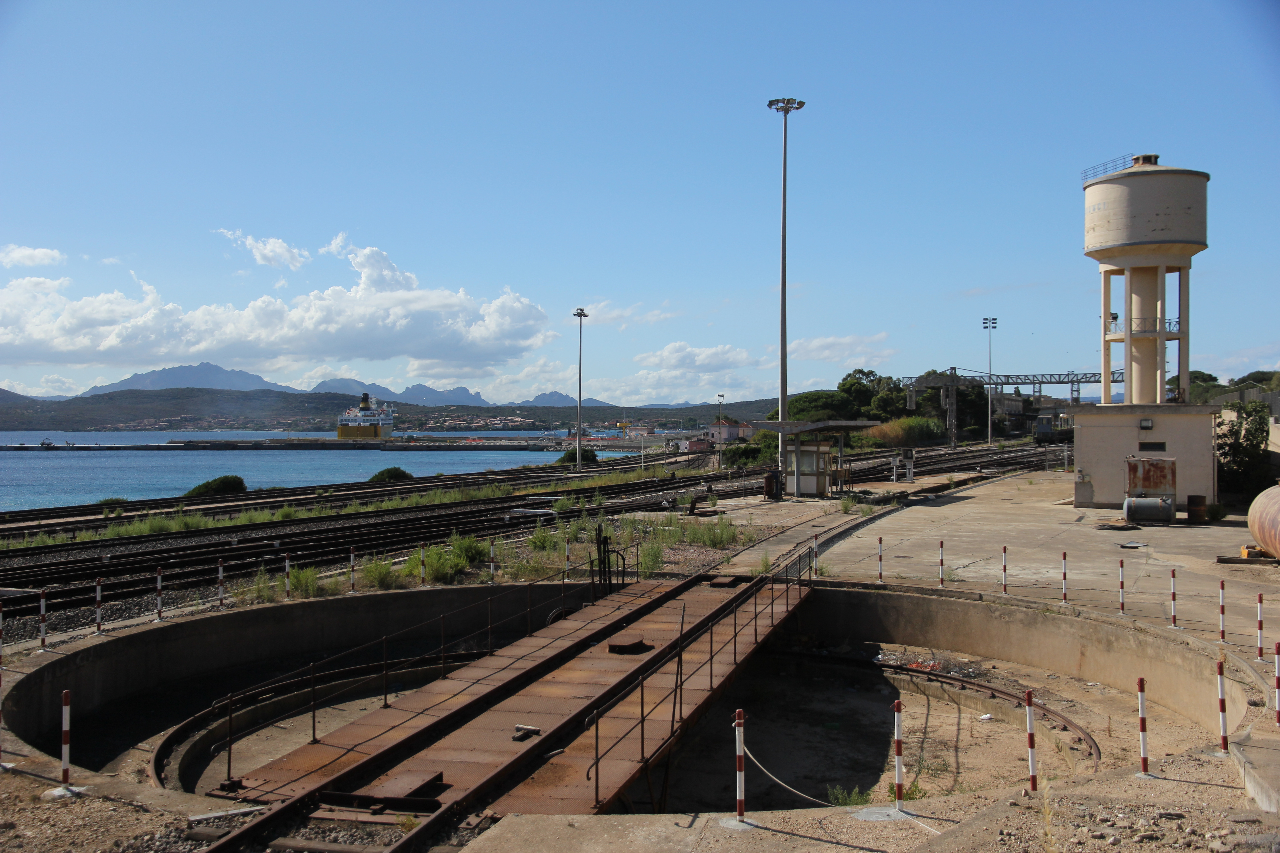 Golfo Aranci - Stazione ferroviaria